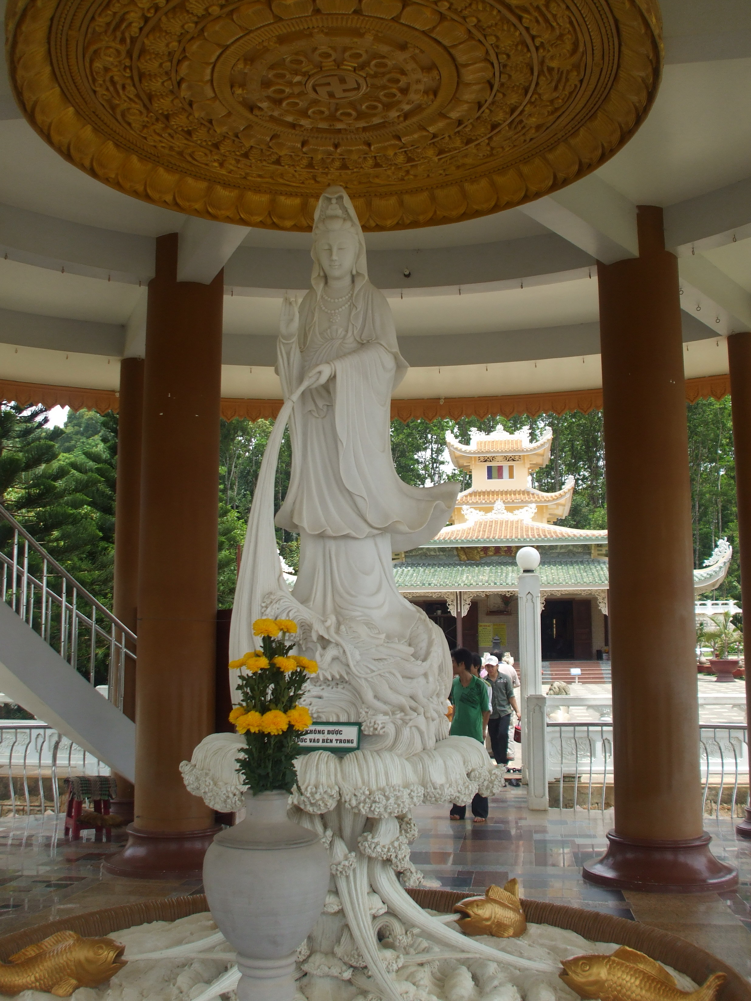 Tượng Bồ tát Quan Âm tại chùa Vạn Linh trên đỉnh Núi Cấm (Tịnh Biên, An Giang, Việt Nam).